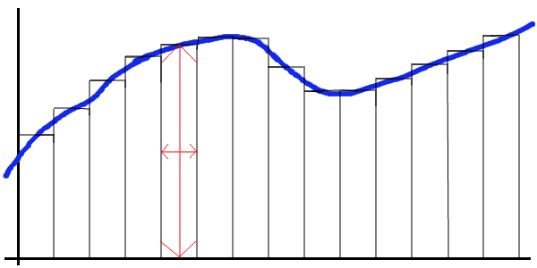 Een Riemannsom.